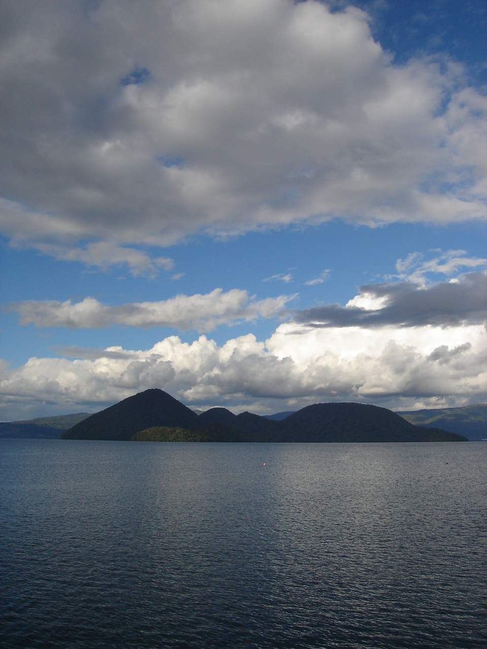 Lake Toya(Toyako)